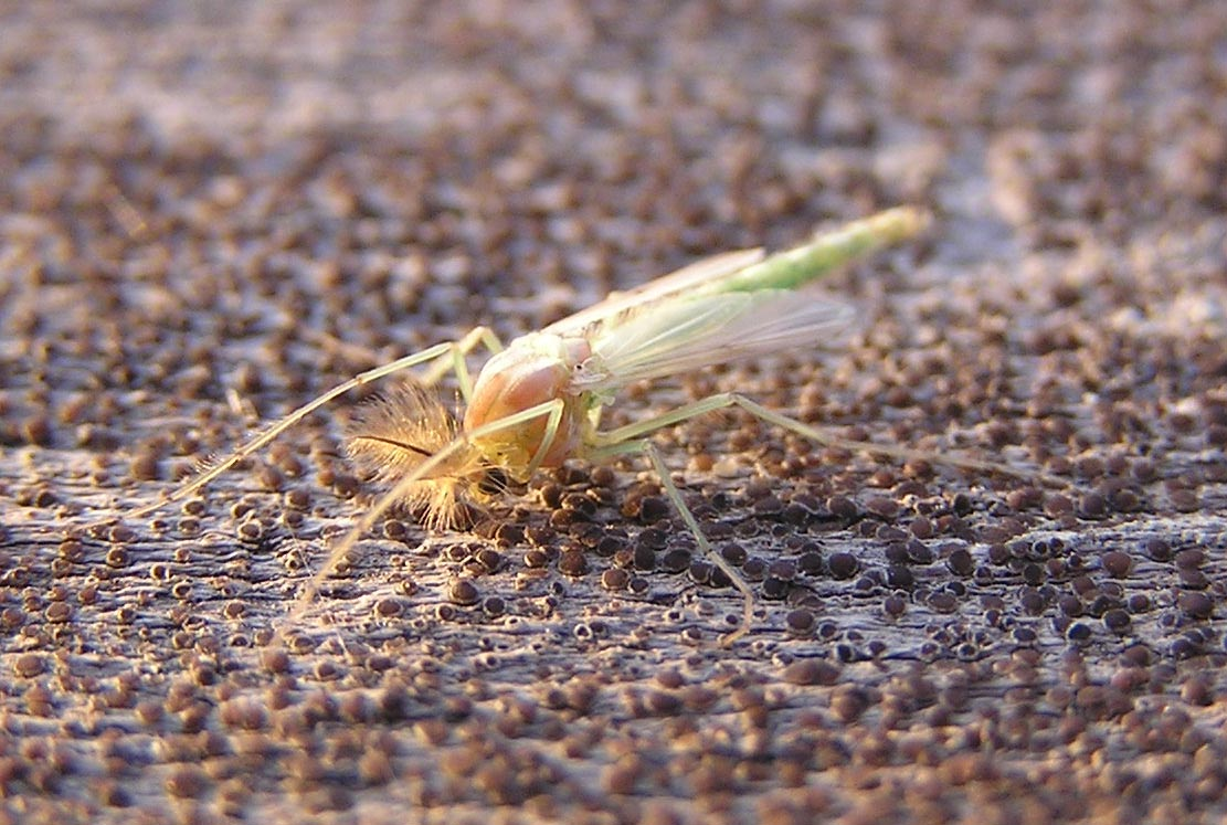 Комар-звонец (Chironomidae) , определение до вида невозможно, сфотографировано в Седово, июнь 2007